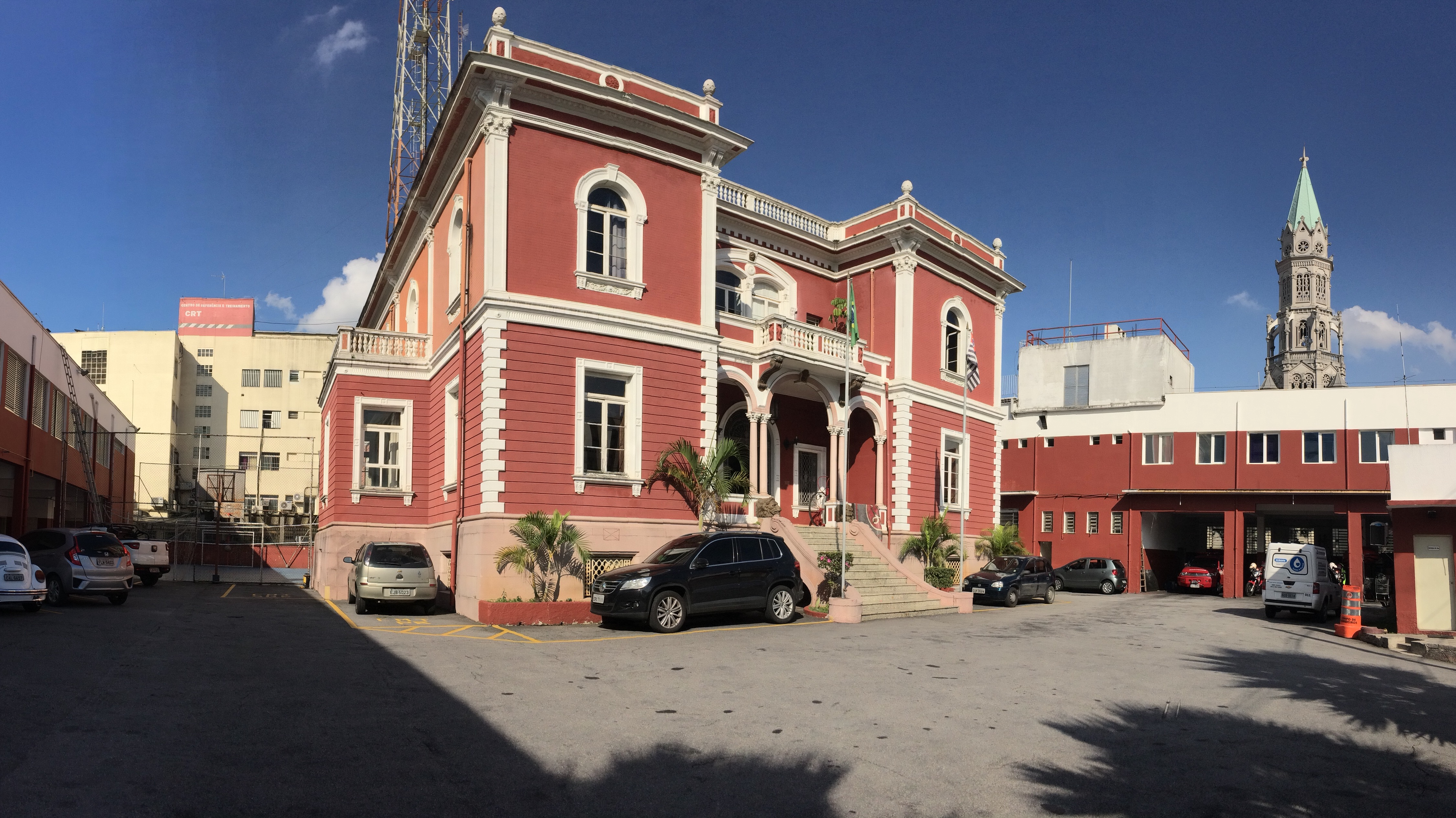 Sede da instituição